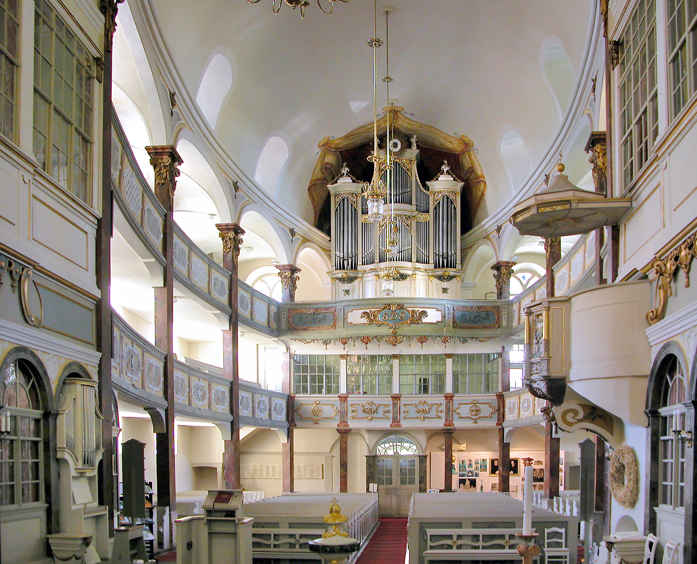 18.05.2007 01896 Pulsnitz, Kirchplatz (GMP: 51.181899,14.011805): St. Nikolai Kirche, Ersterwähnung 1473. Nach Bränden errichtet 1742-1745 Bau- meister Andreas Hünichen (George Bähr Schüler) in dem gotischen Langhaus eine barocke Emporenkirche. 1779 wird die vom Pulsnitzer Orgelbauer Pfützner geschaffene Orgel in Dienst gestellt. Der Rokokoprospekt ist bis heute erhalten. [DSCN28024.TIF]20070518325DR.JPG(c)Blobelt